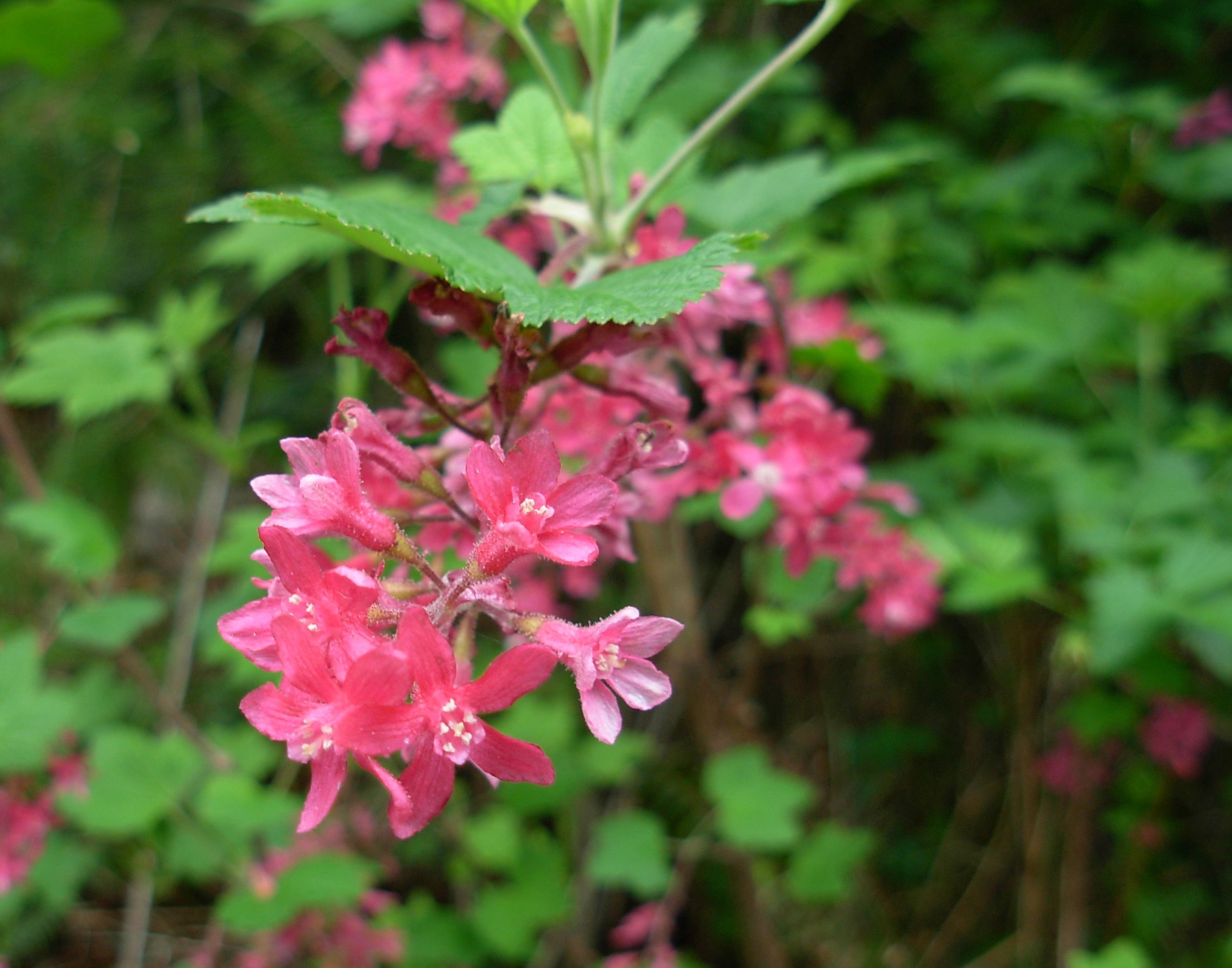 Ribes sanguineum i060108 211